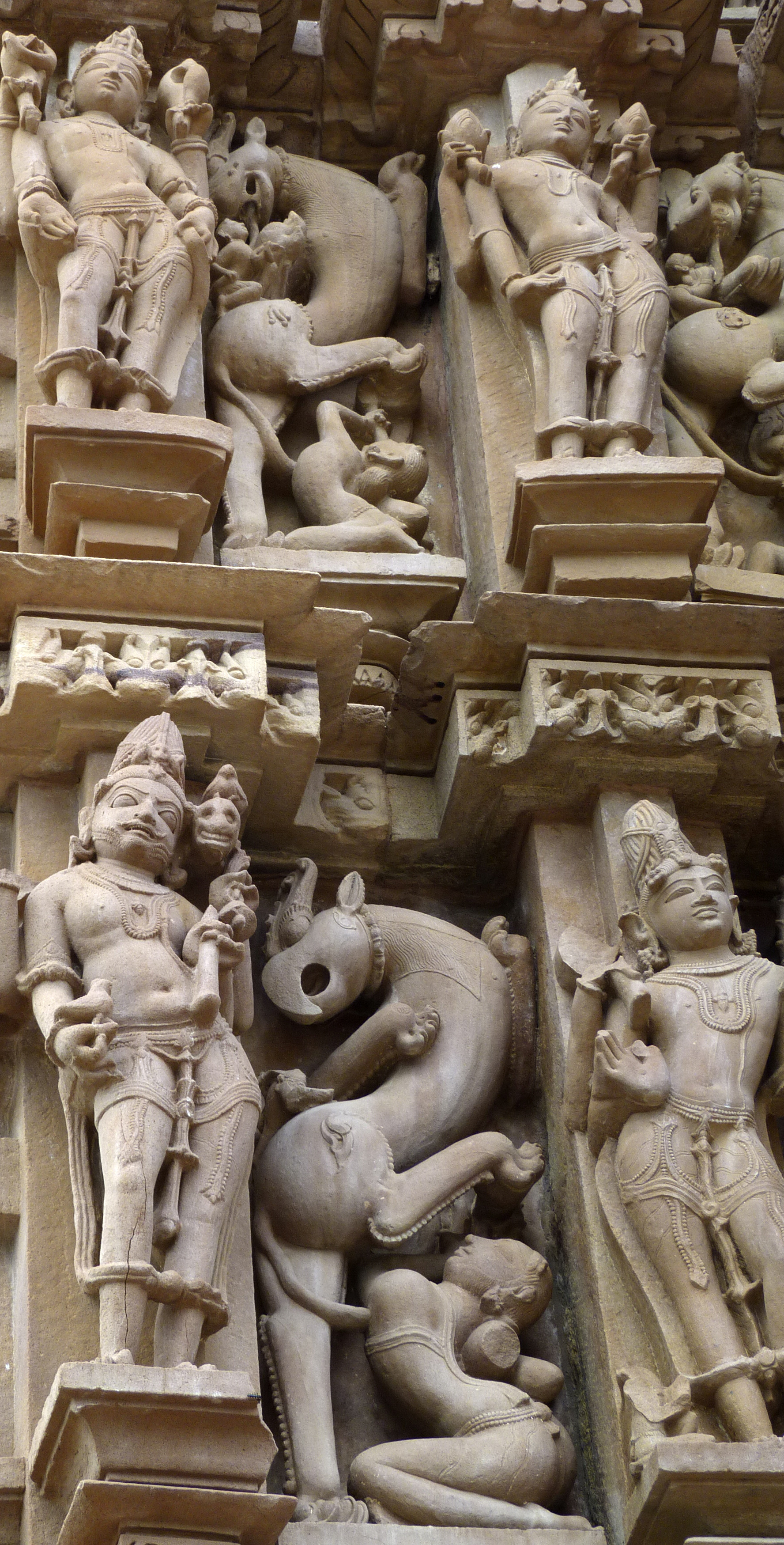 Sárdulas míticos rampantes en los entrantes de los muros de los templos hindúes.